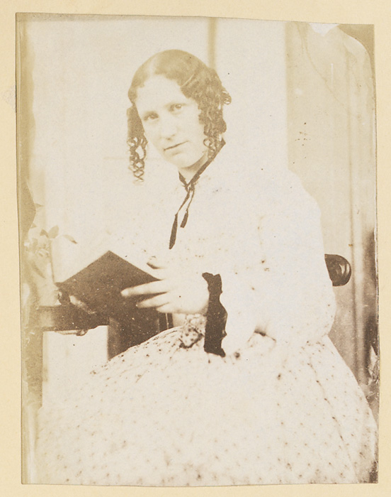 Ffotograffydd/Photographer: Mary Dillwyn (1816-1906) Nodyn/Note Probably a self portrait. Dyddiad/Date: 1853 Cyfeiriad/Reference: vin00066 (pb02377/038) Rhif cofnod / Record no.: 3590002 Rhagor o wybodaeth am Ffotograffiaeth Gynnar Abertawe yn Llyfrgell Genedlaethol Cymru More information about Early Swansea Photography at the National Library of Wales